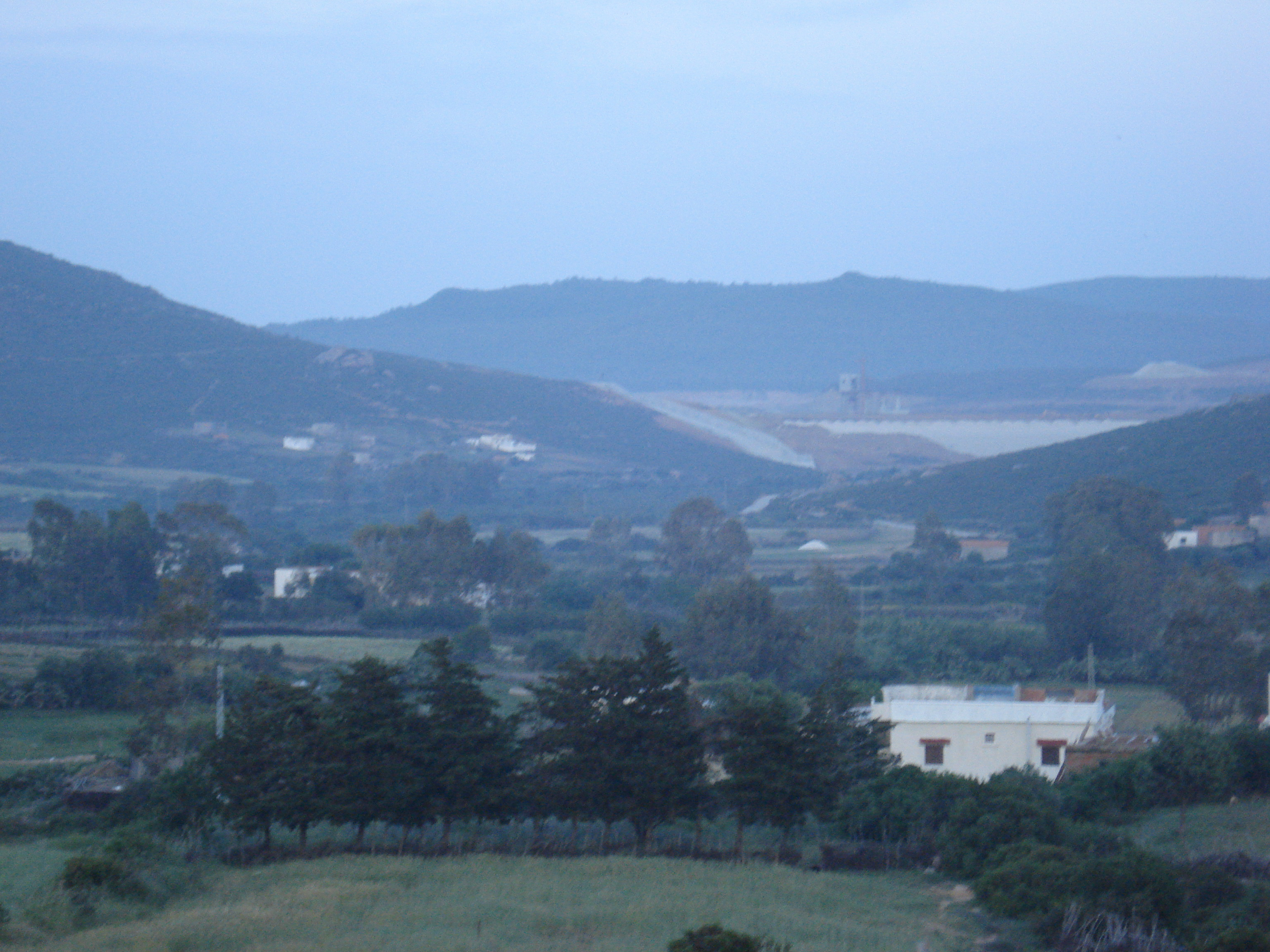 Village "Ghirane غيران" près de Cap Serrat (Barrage Gamgoum سد قمقوم en arrière-plan), Délégation de Sejnane, Gouvernerat de Bizerte, Tunisie